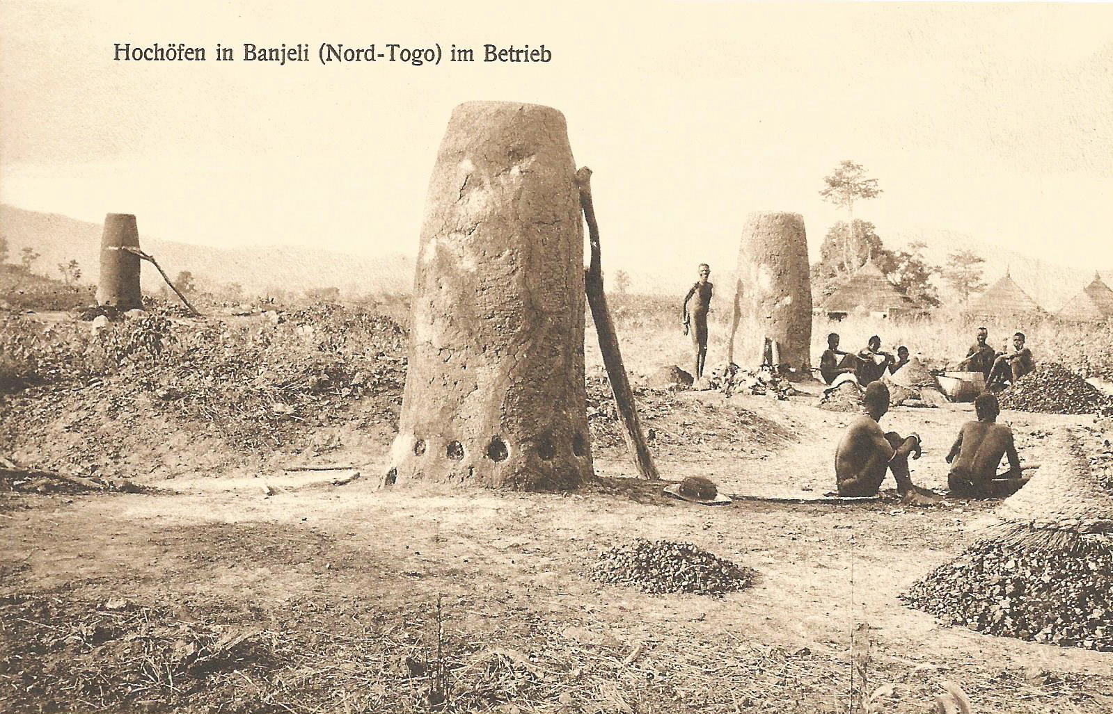 Hochöfen in Banjeli (Nord-Togo) im Betrieb. Carte postale ancienne, sans indication d'auteur, d'éditeur ou de date. Collection particulière